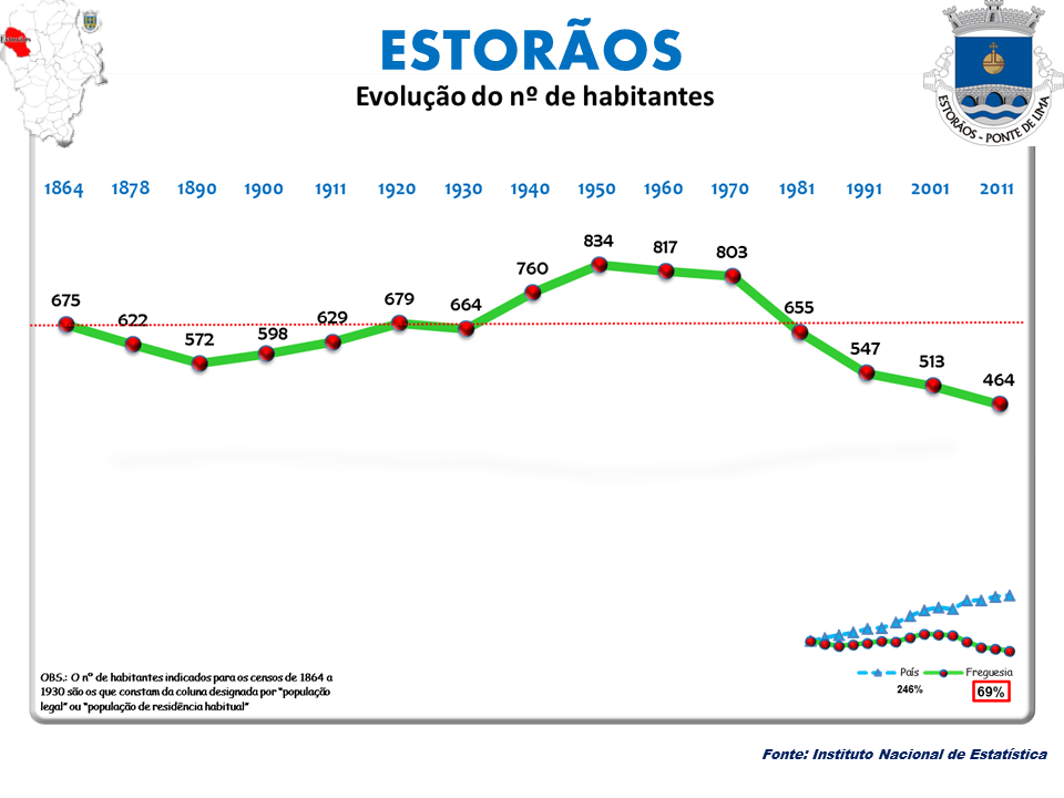 Censos 1864/2011